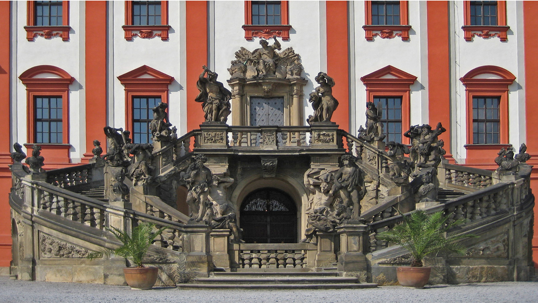 Schloss Troja in Prag, große Freitreppe mit den Skulpturen von George und Paul Heermann